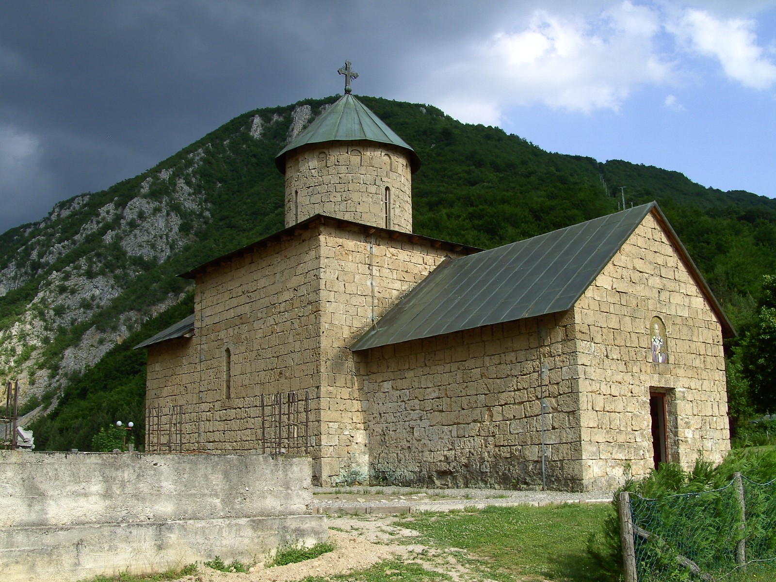 Digital StillCamera